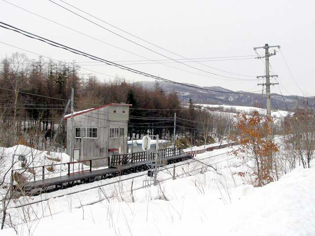 駅舎。 相対式ホームで右側の林の中に反対側のホームがある。 撮影場所 古瀬駅横道路より